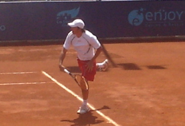 Adrian Garcia, La Serena Open